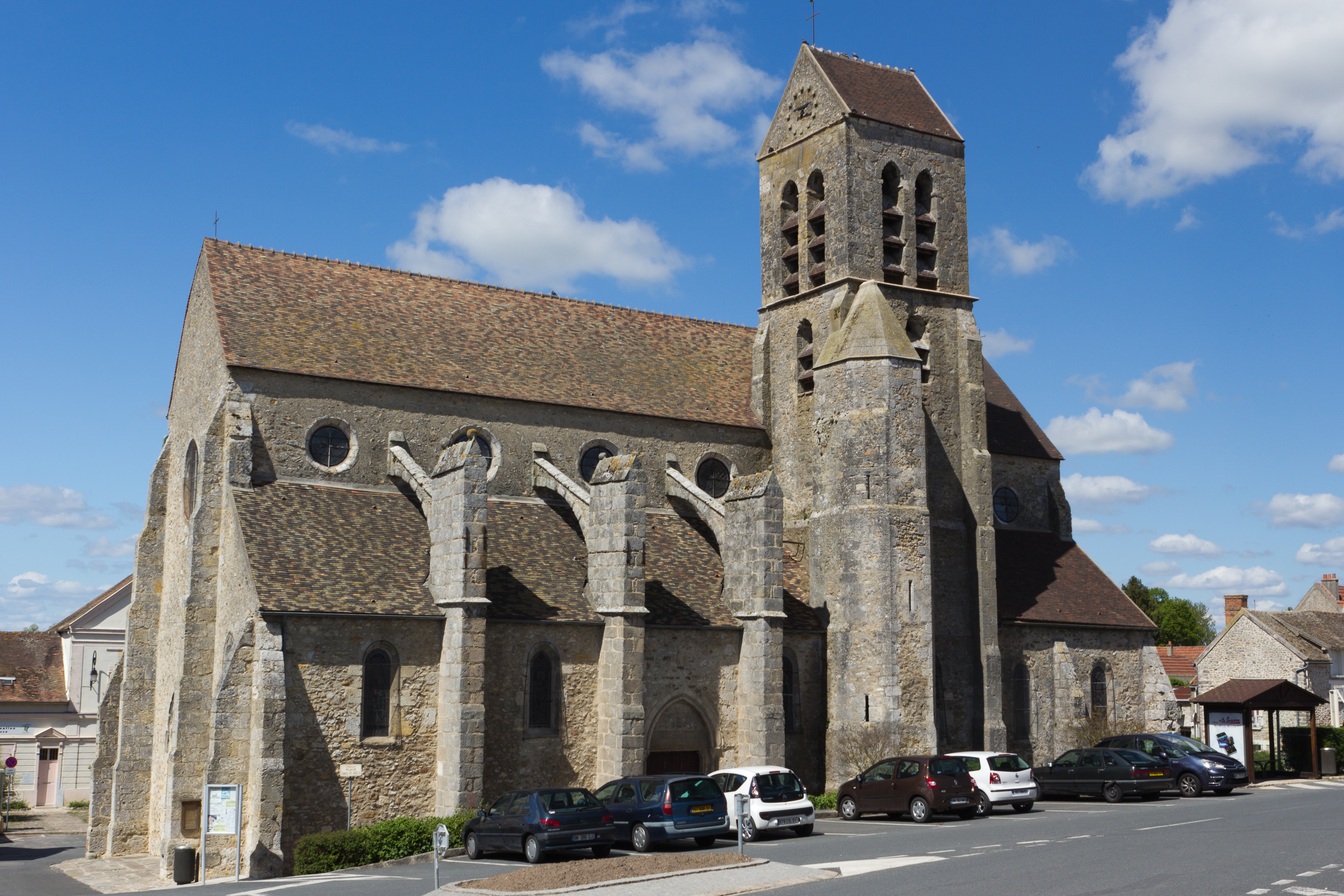 Église d'Itteville, Itteville, département de l'Essonne, France.